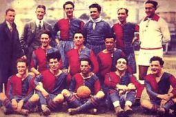 Genova, Campo di Via del Piano, 2 marzo 1924. La formazione del Genoa CFC scesa in campo nella sconfitta interna contro l'AC Padova (1-2) valevole per la 18ª giornata del campionato italiano di Prima Divisione 1923-24, Lega Nord, girone A. Da sinistra, in alto: Castello (dirigente), W. Garbutt (allenatore), D. Bellini, G. De Prà, R. De Vecchi, Alfieri (arbitro); al centro: O. Barbieri, L. Burlando, E. Leale; in basso: E. Neri, E. Sardi (II), E. Catto (I), A. Santamaria (I), A. Bergamino (I).